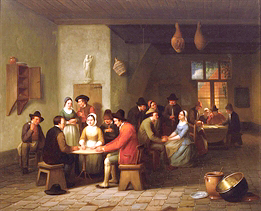 Charles Venneman (* 1802, † 1875): Biergerversammlung